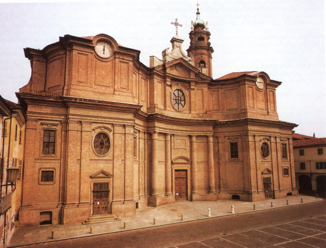 Duomo di Carignano (Torino). Venne costruito tra il 1756 e il 1766 su progetto di Benedetto Alfieri.